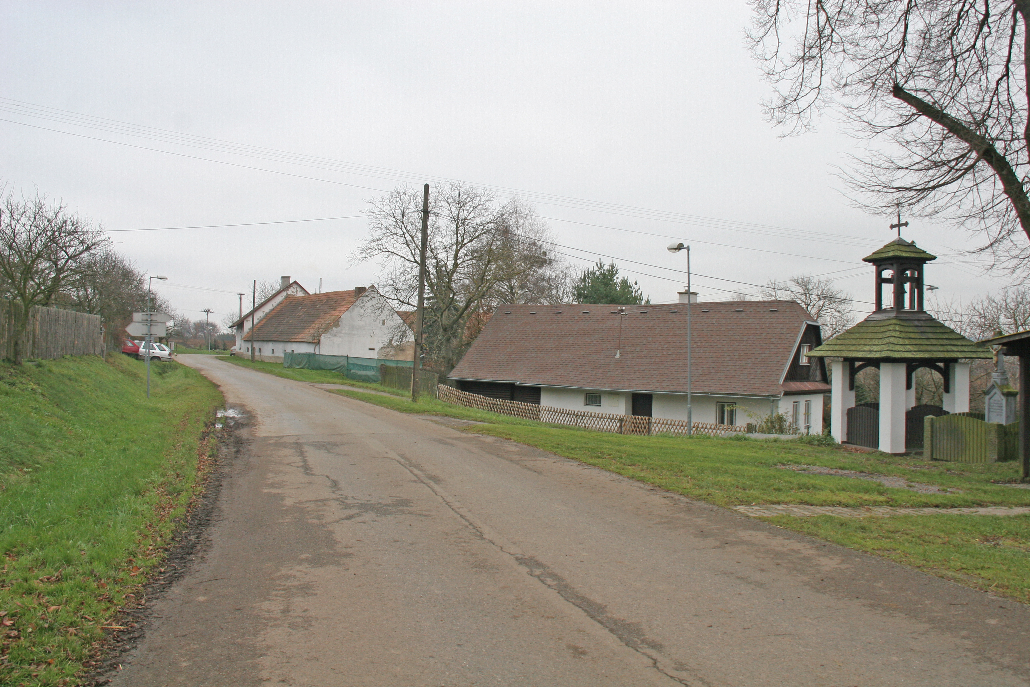 Nové Lhotice čp. 14